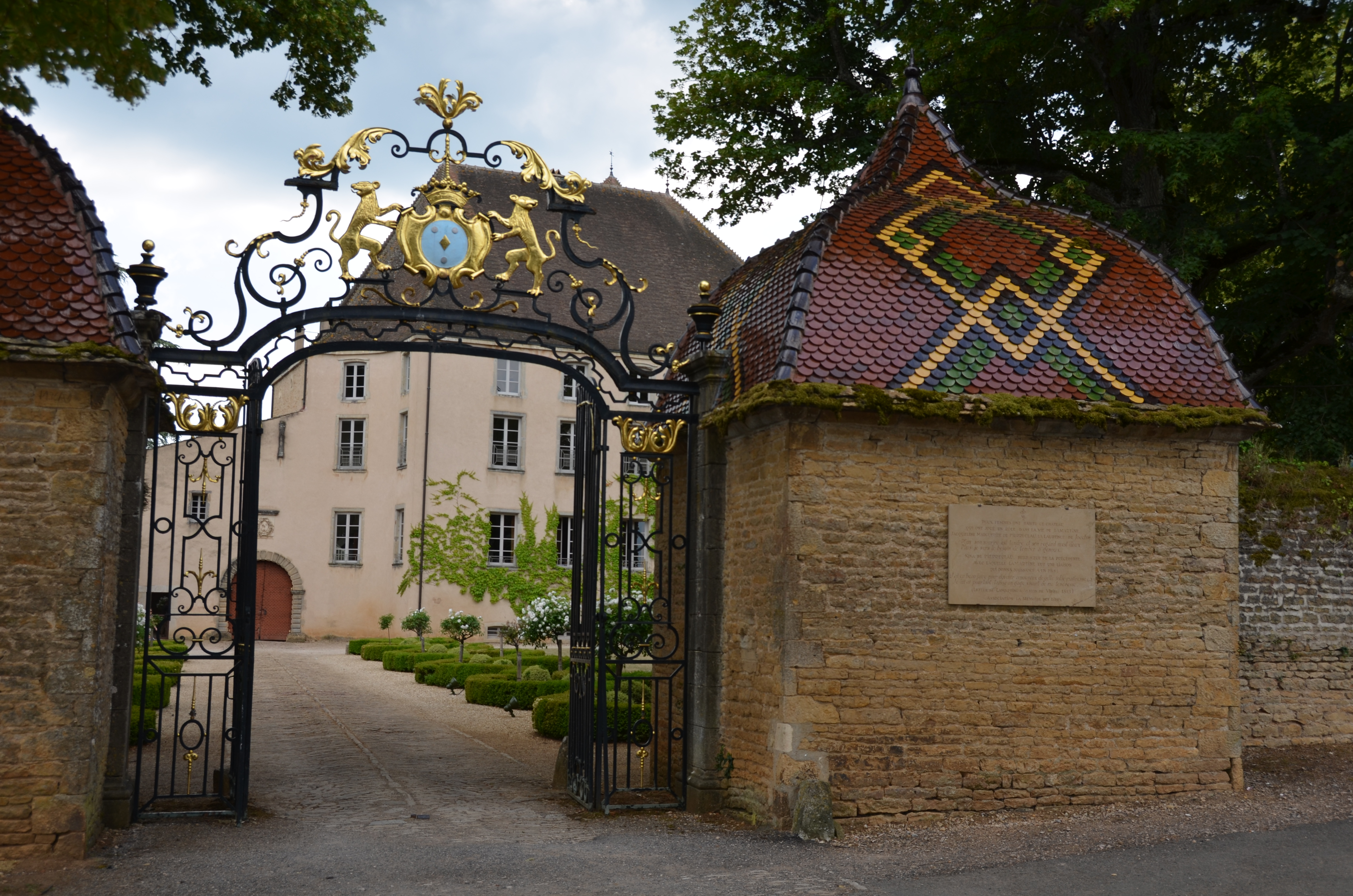 Entrée du château de Pierreclos, Saône et Loire (France)